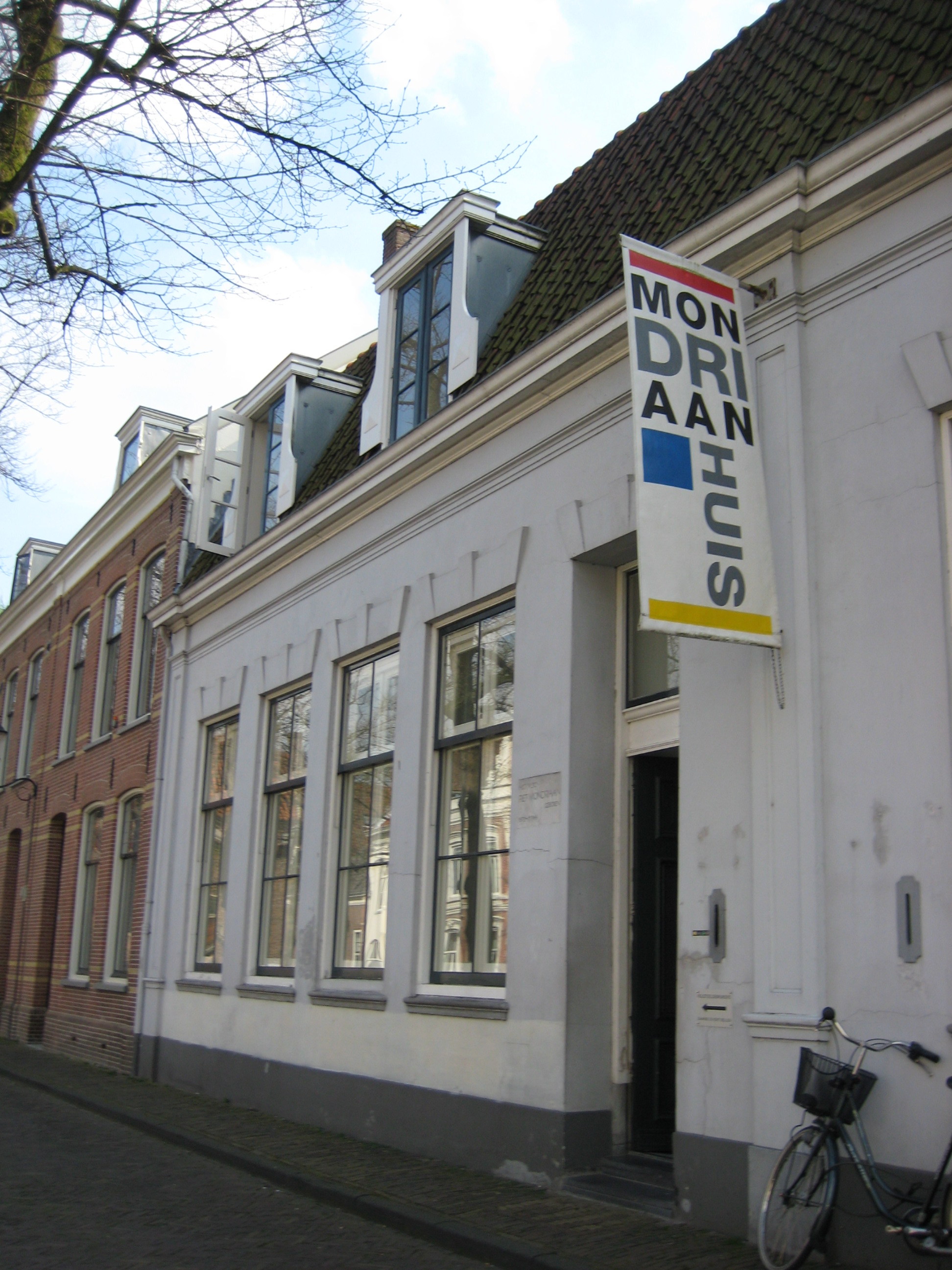 Piet Mondriaans house of birth in Amersfoort, Netherlands